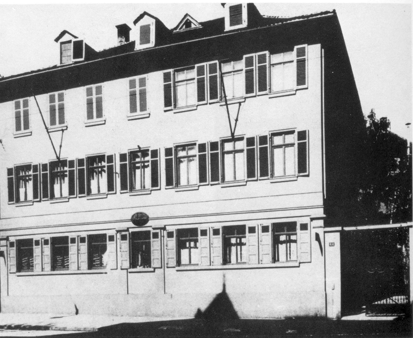 Straßenseite des Hartmann-Reinbeckschen Hauses in Stuttgart, Friedrichstraße 14, Foto von Unbekannt, um 1890.